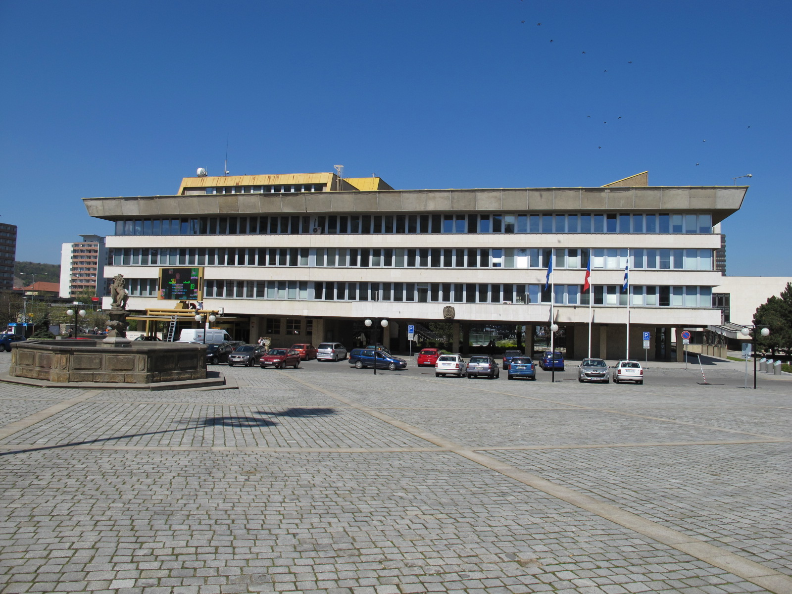 Radnice v Mostě.